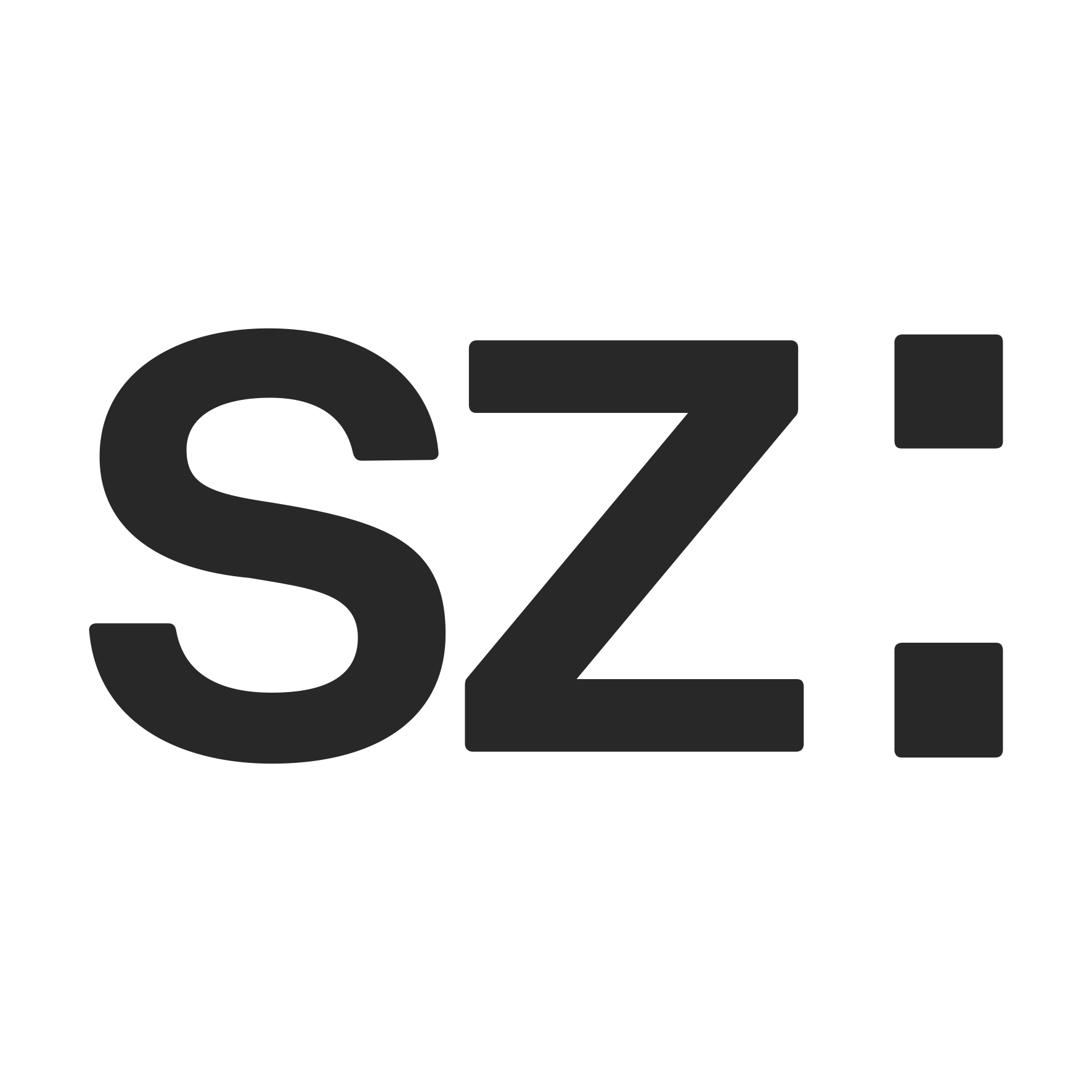 Ez az új logo, melyet a tagság a 2017. évi márciusi kollégiumi gyűlésen hagyott jóvá.